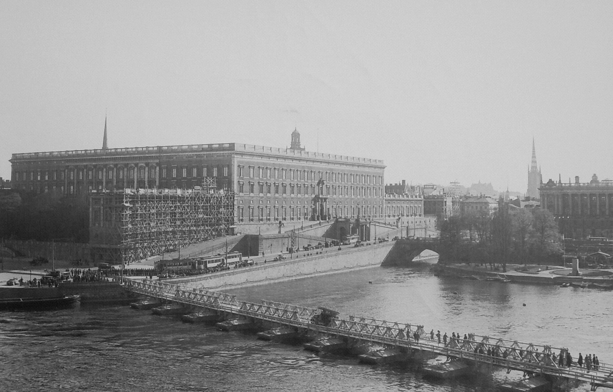 Stockholms slott, fasad mot norr med Strömbron i föregrunden